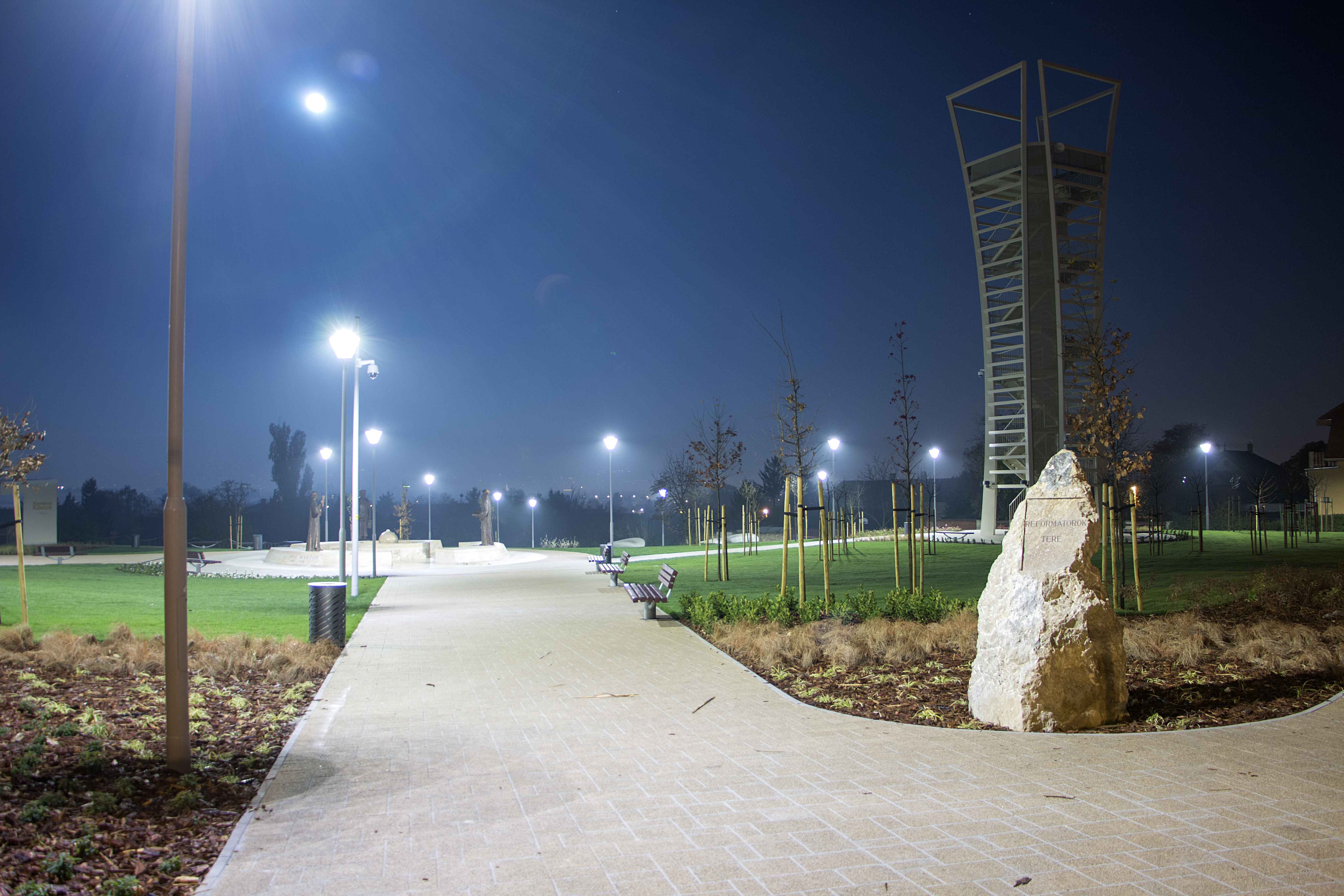 A Reformátorok tere bejárata hajnalban